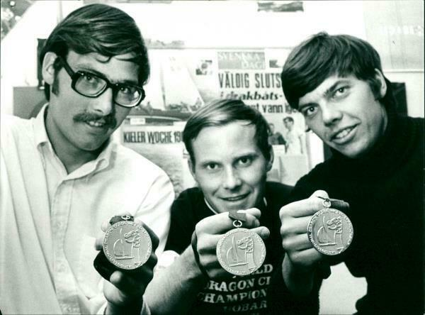 The brothers, Peter Sundelin, Jorgen Sundelin and Ulf Sundelin